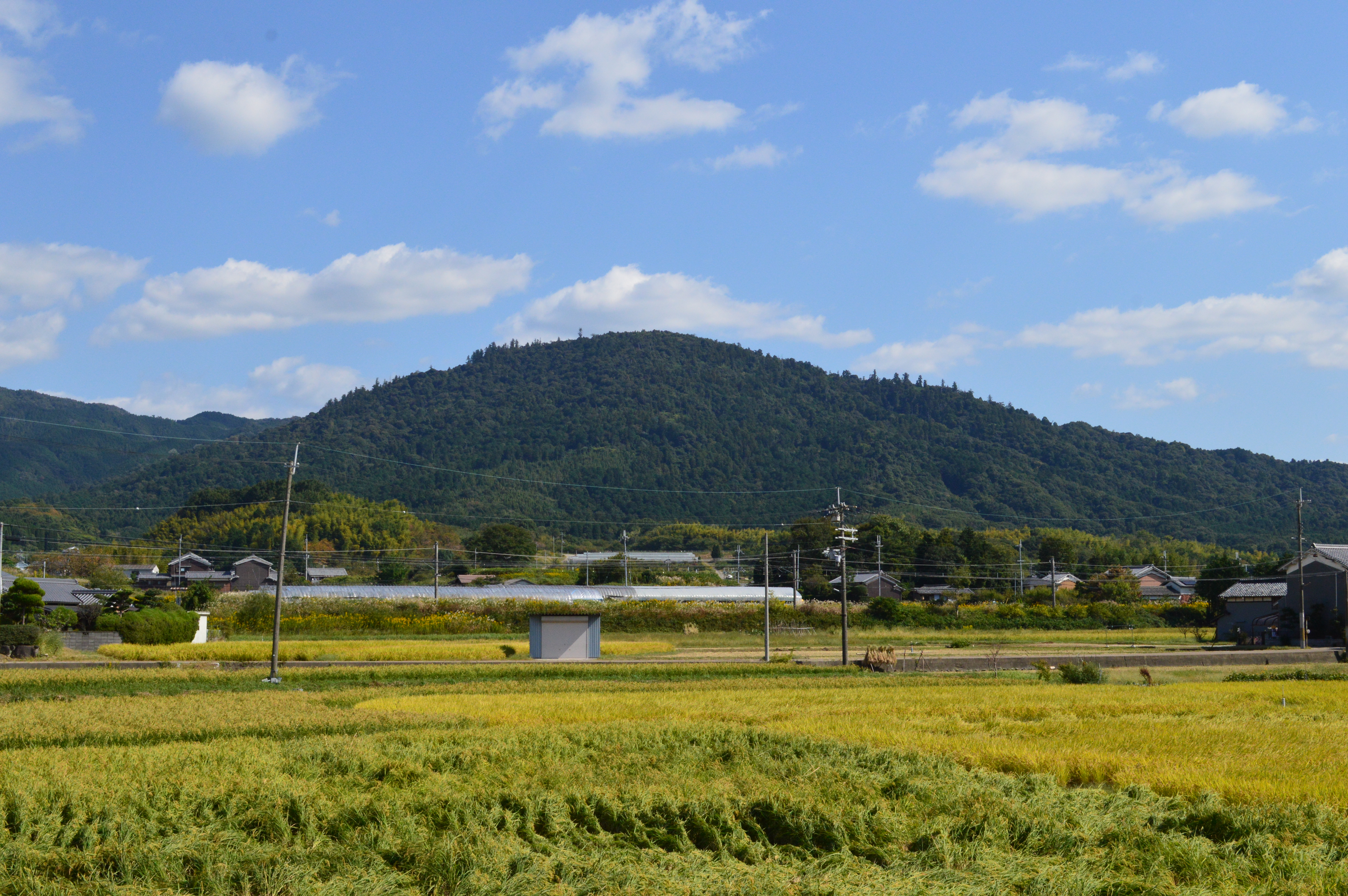 三輪山 (箸墓古墳より)